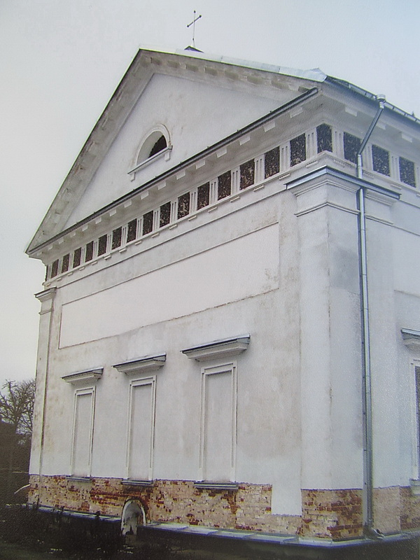 Вярэйкі. Касцёл